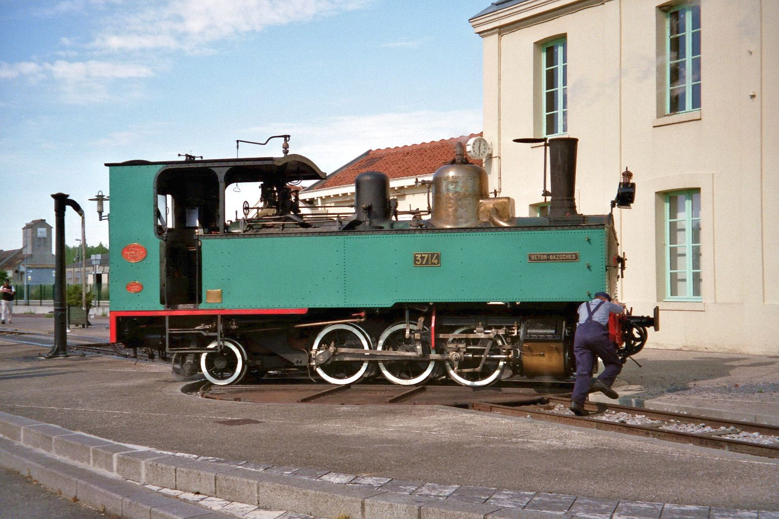 En gare de Noyelles, retournement de la 031T Buffaud-Robatel n° 3714 sur la plaque tournante devant le bâtiment-voyageurs de la SNCF.